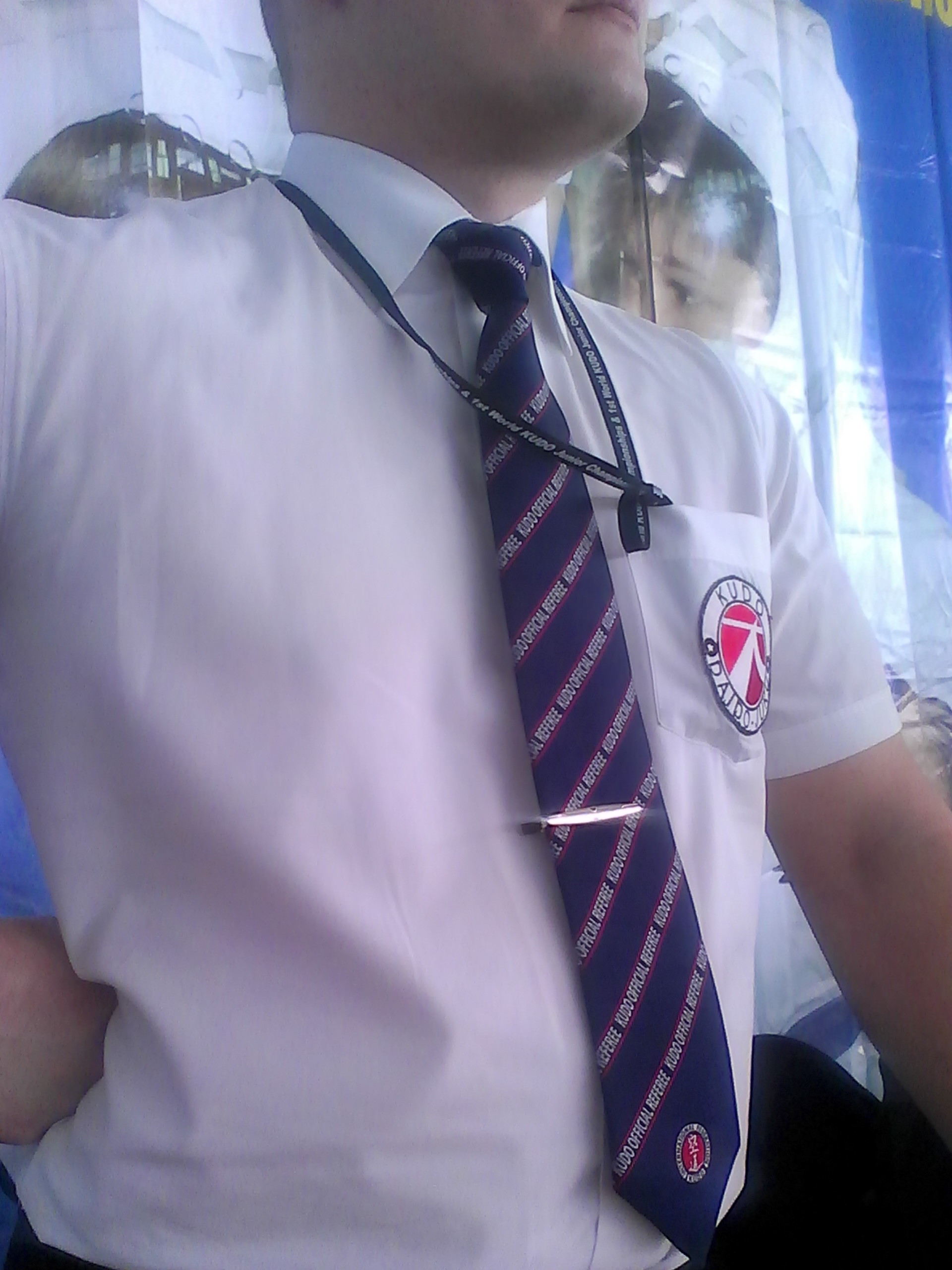 Судьи международной категории по КУДО отличаются галстуками фиолетового цвета с бордовыми полосками